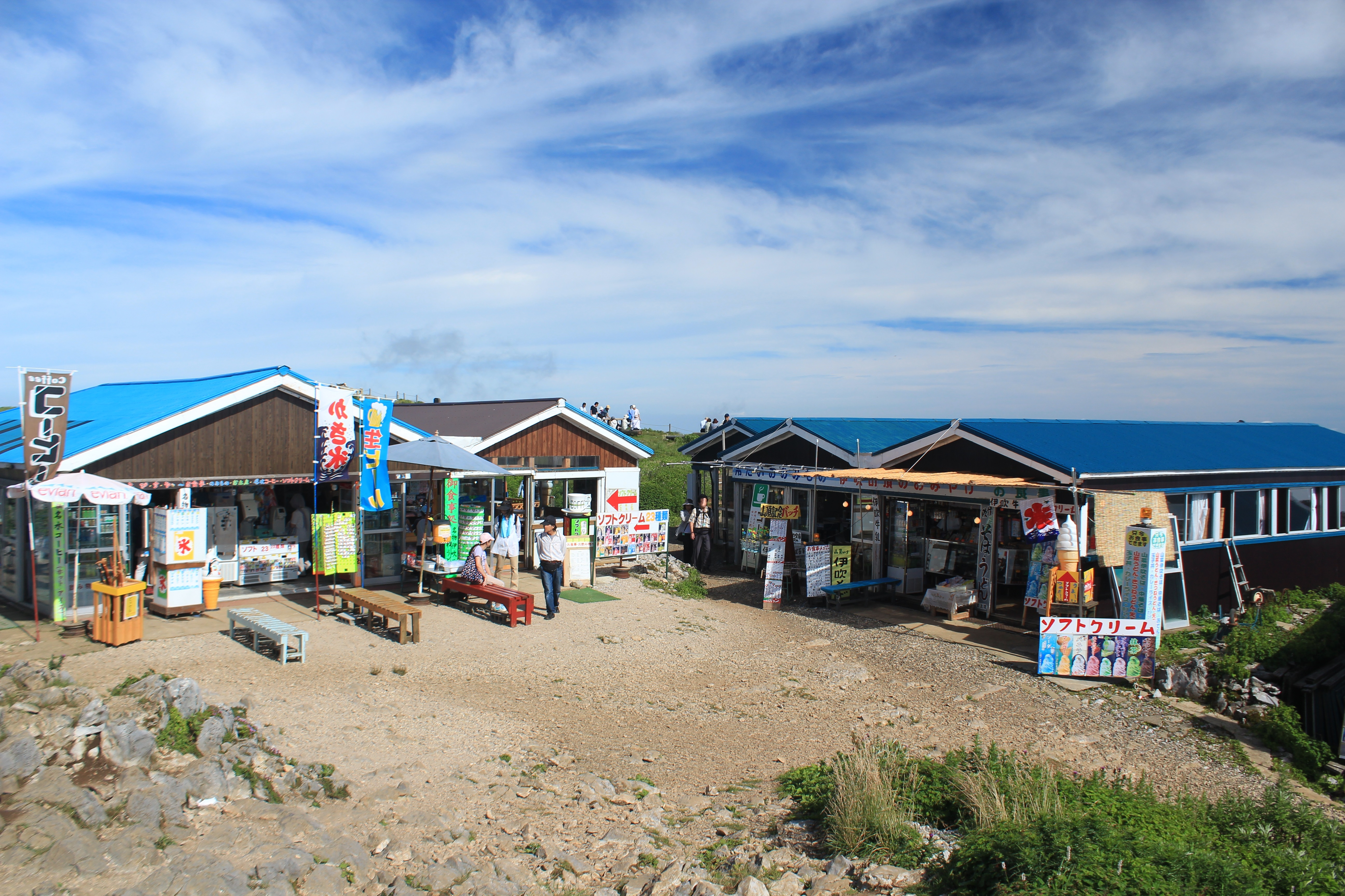 伊吹山山頂部の山小屋と売店、滋賀県米原市